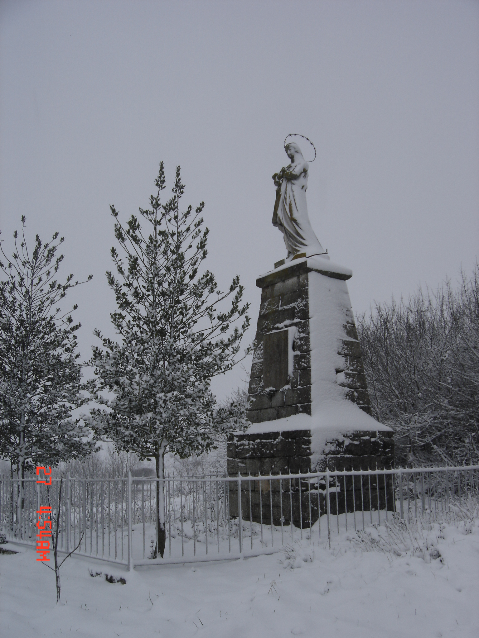 Etrepigney-Vierge